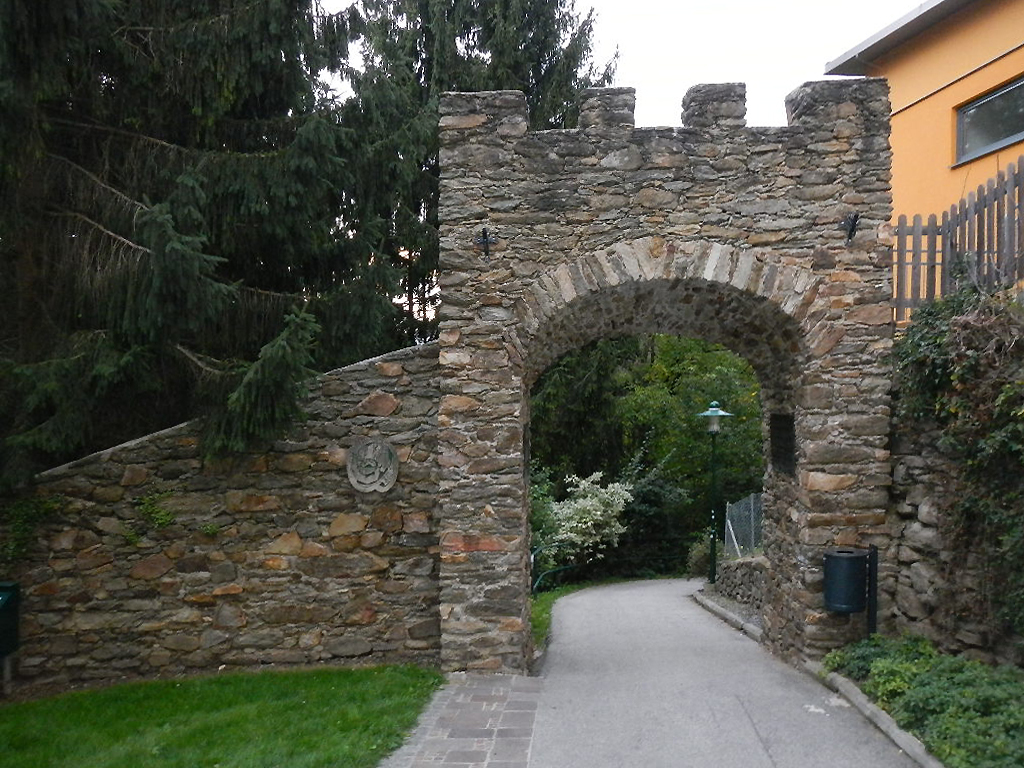 Friedberg, Steiermark, Österreich: Tor in der Stadtmauer